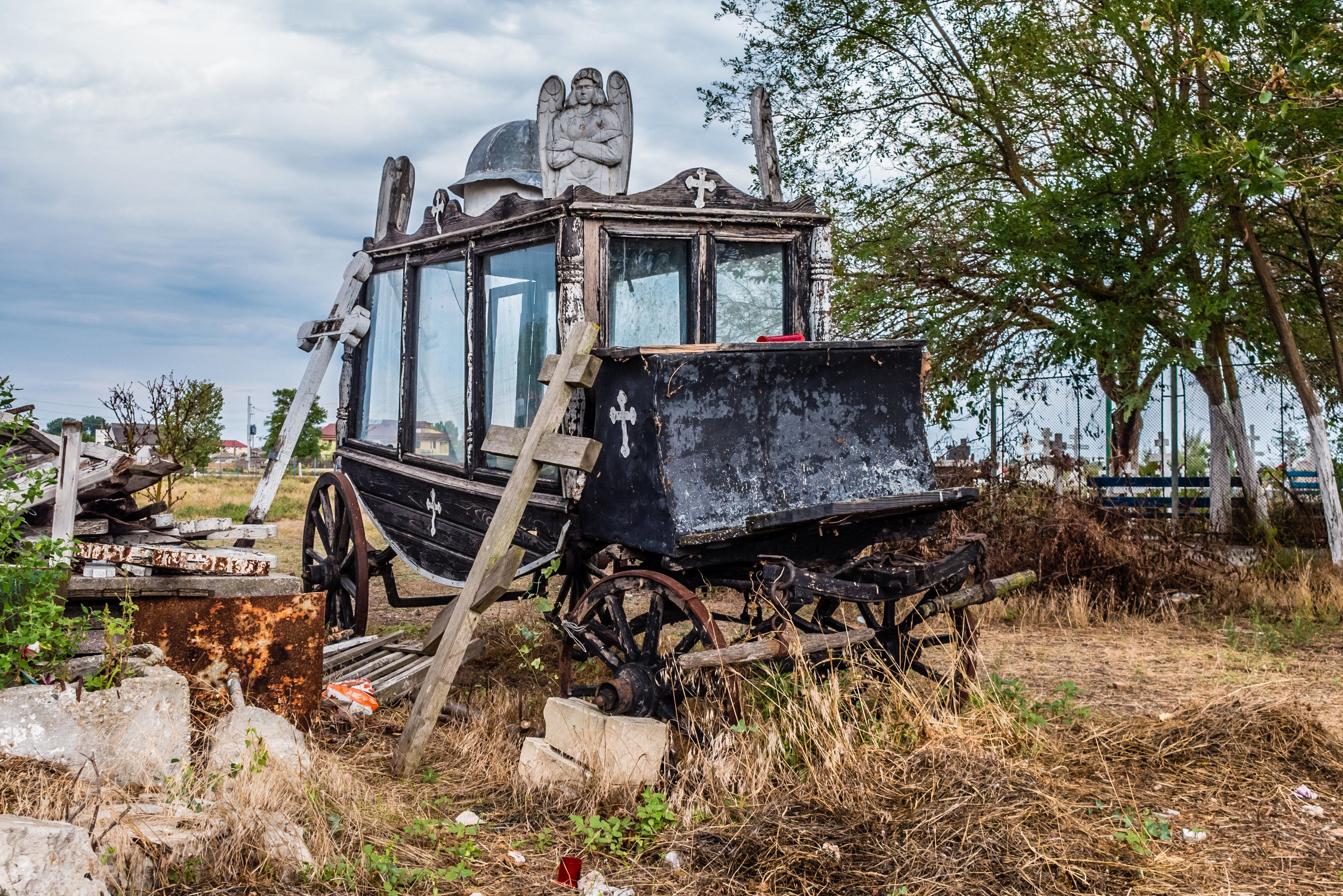 Vechiul dric din Cimitirul Cosmopolit Sulina